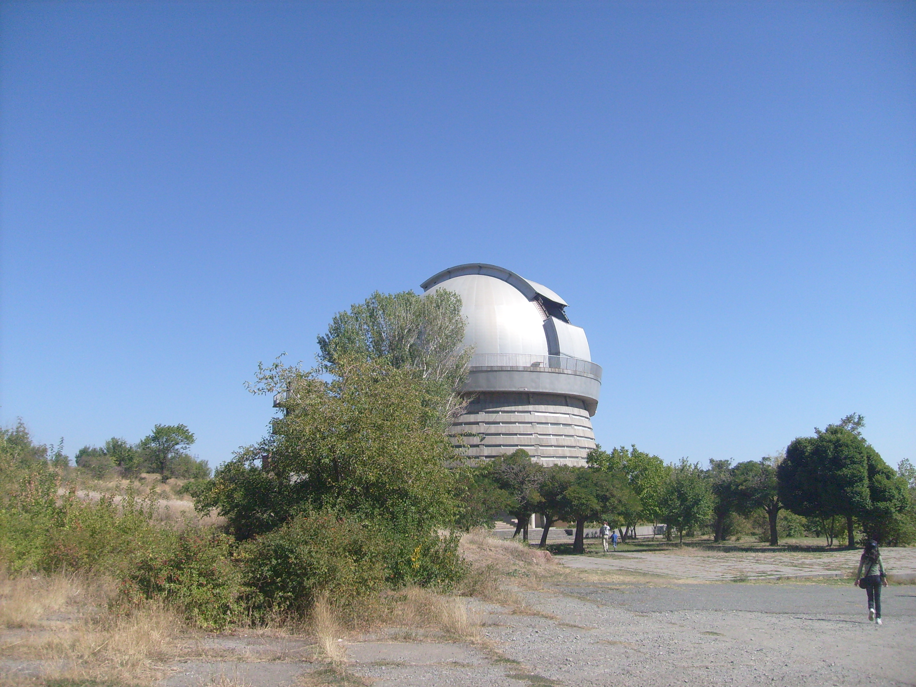 Բյուրականի աստղադիտարանի հիմնական դիտակի (2.6մ) շենքը 28/6